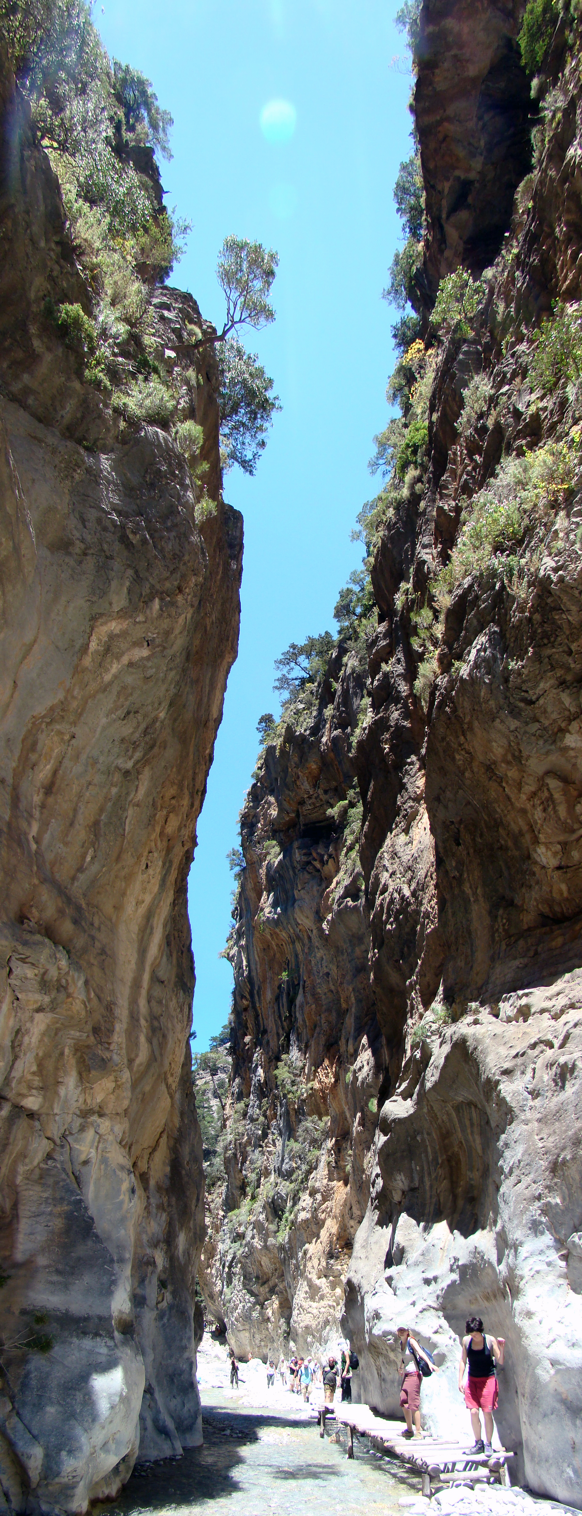 Samaria Gorge